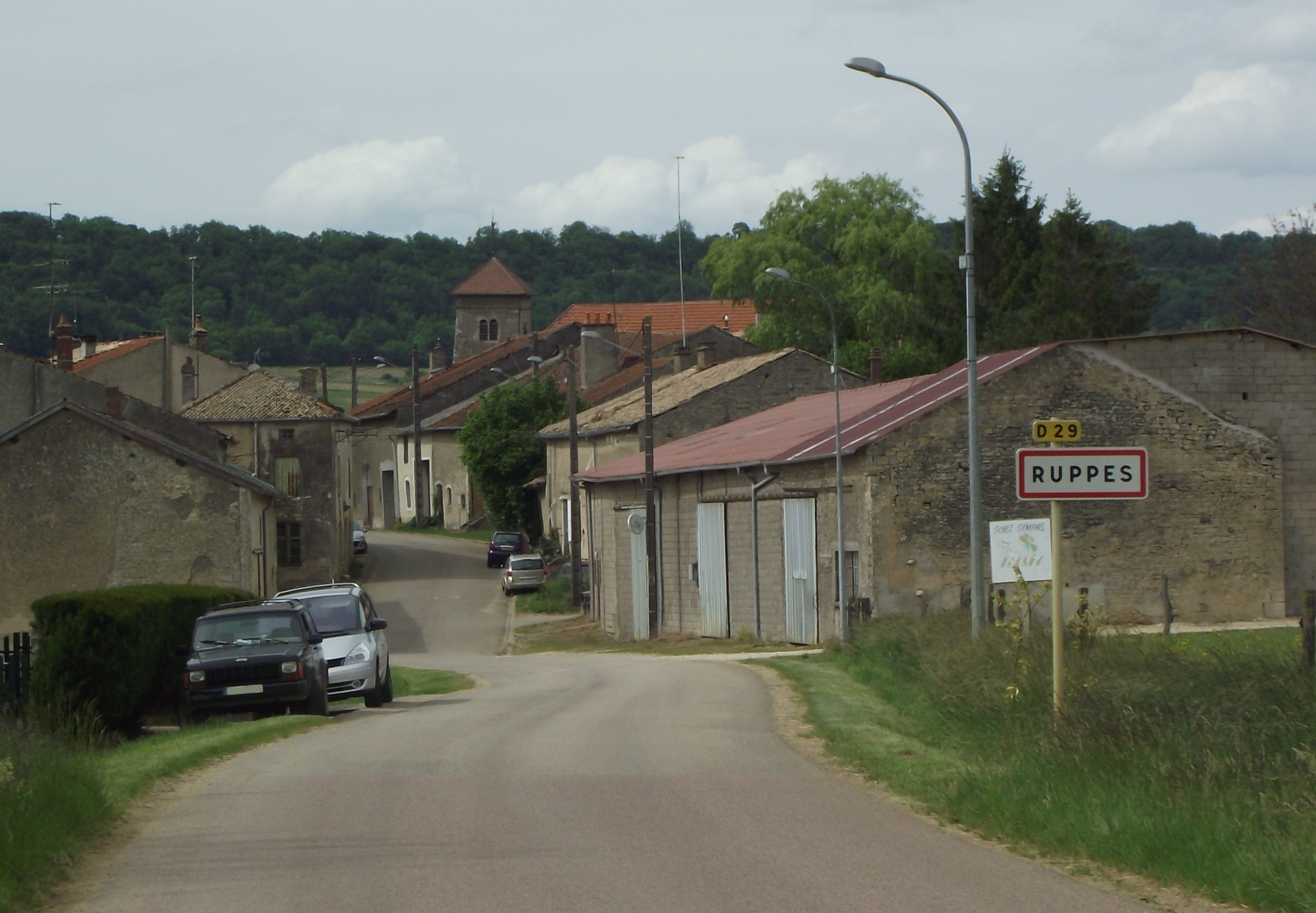 Entrée du village de Ruppes